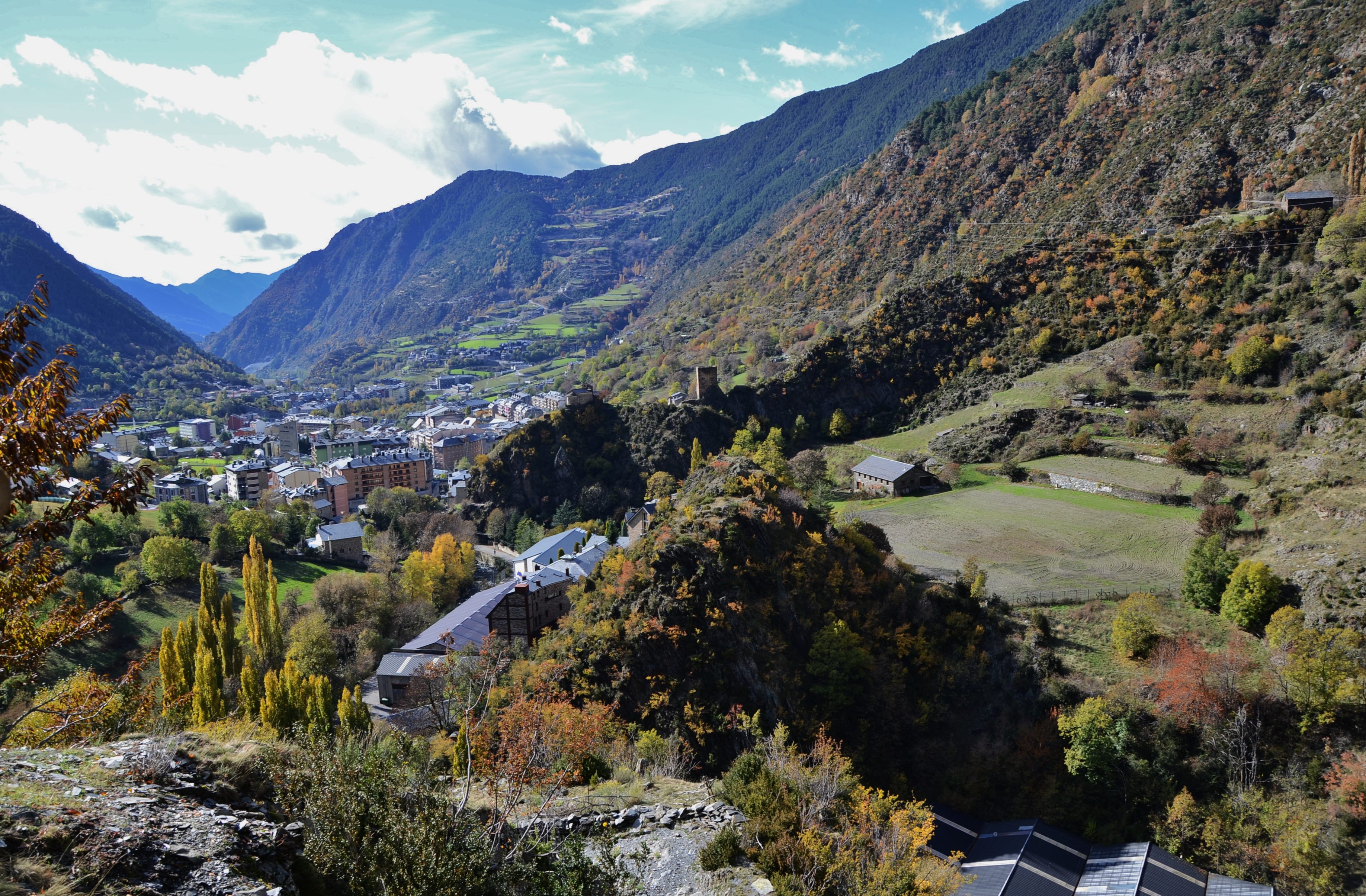 Els Cortals d'Encamp This is a a photo of a natural area in Andorra with id: AD-PPCE